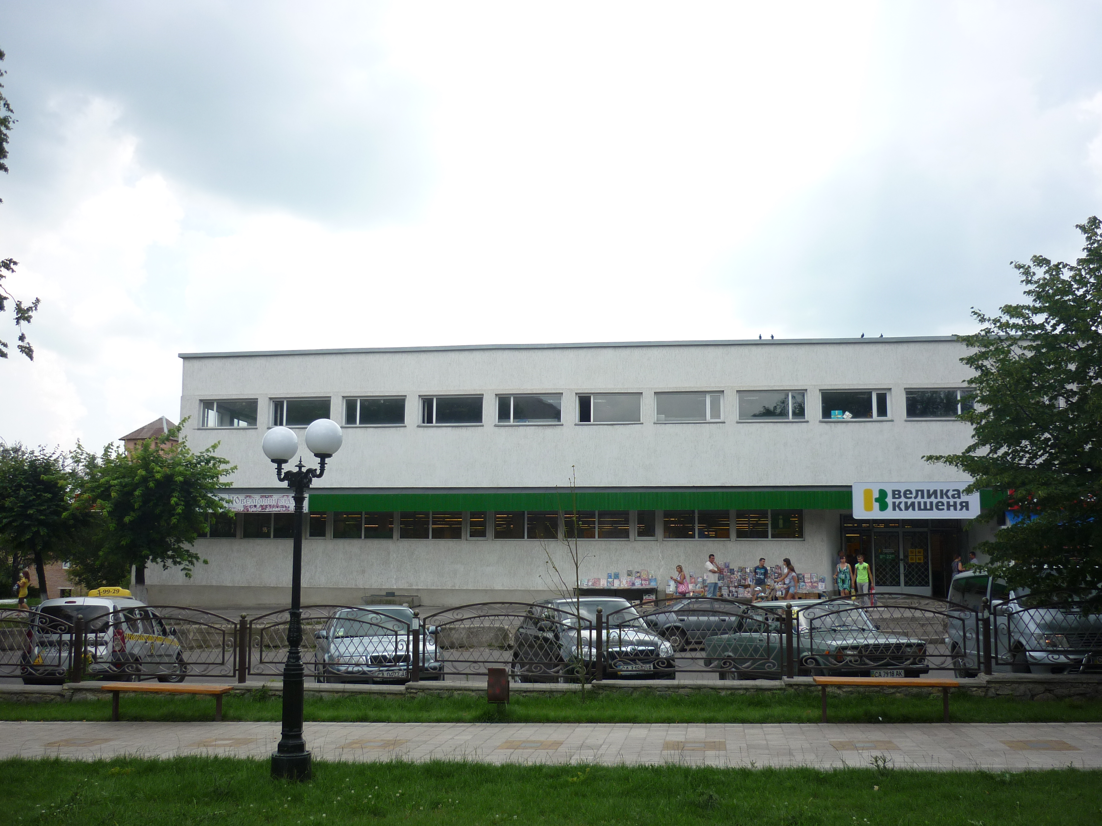 Магазин "Велика кишеня" в центрі міста Умань. Колишній Будинок торгівлі